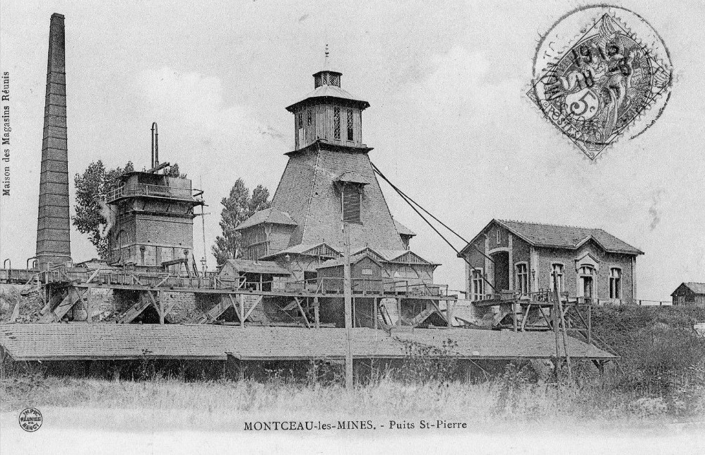 Le puits Saint-Pierre.